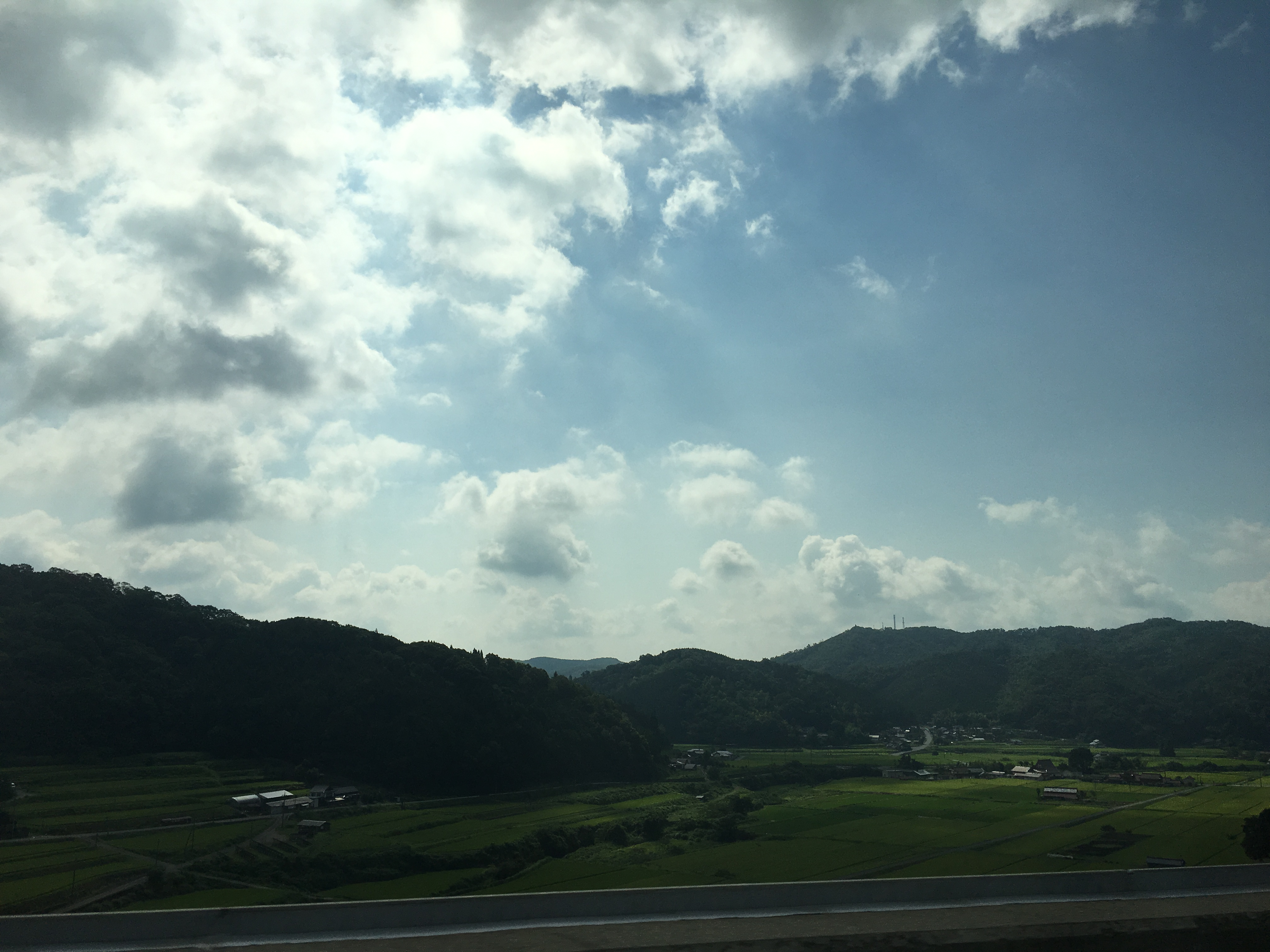 広島県庄原市口和町 (Kuchiwacho, Shobara, Hiroshima)